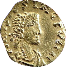 Tiers de sou d'or (trémissis) de Paris aux noms de Dagobert Ier et saint Eloi. Buste diadémé, drapé et cuirassé à droite. Monnaie : or. 1,35 g ; diamètre maximum : 1,4 cm. Atelier de Paris, Paris, 623-639 BnF, département des Monnaies, médailles et antiques, AF 685. introuvable / autres monnaies sur Dagobert dans banque images avec cote Prou 685.